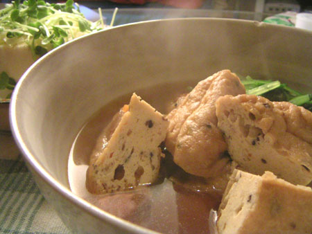 がんもどき再び